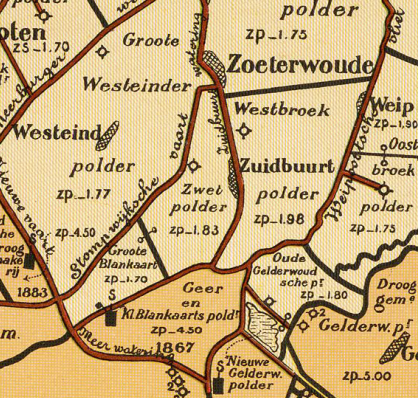 Zwetpolder